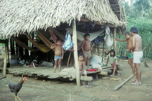 Kaxararí